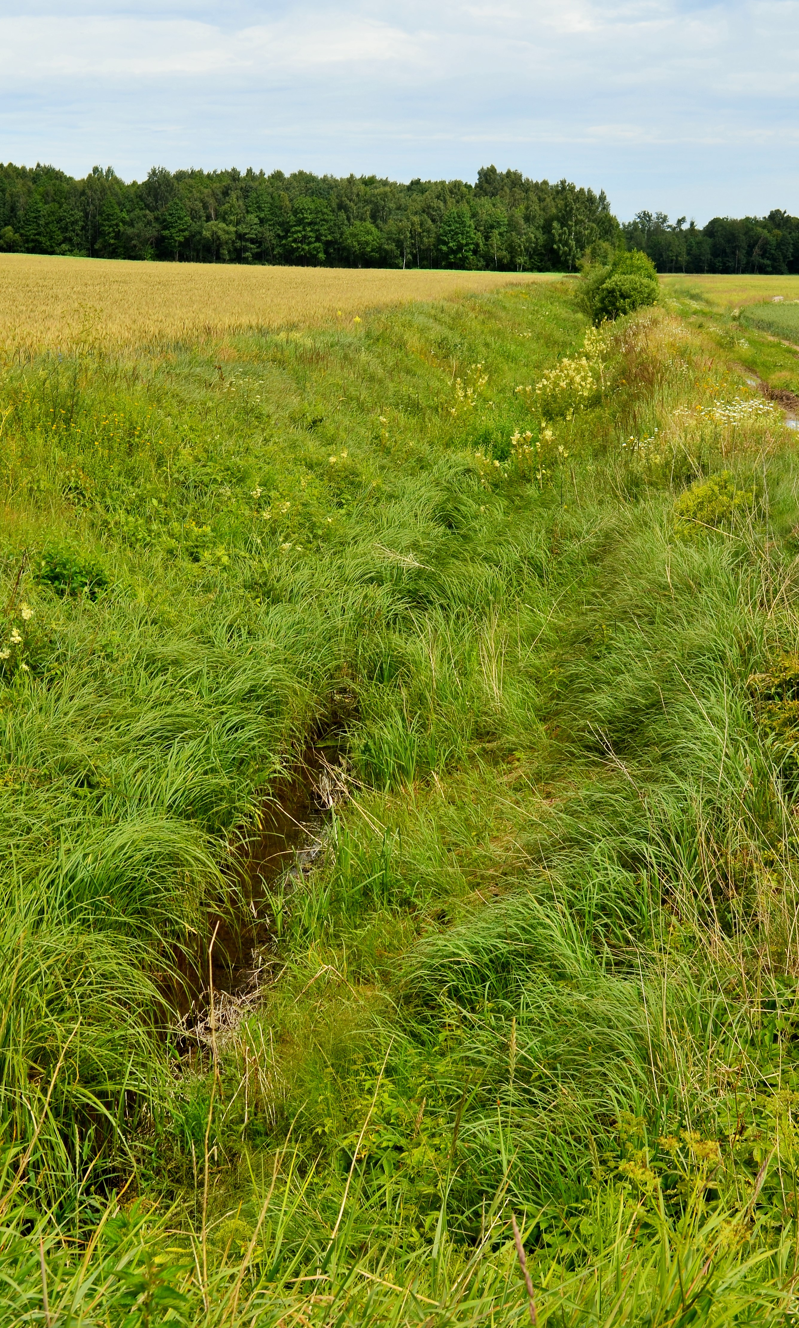 Aukupė (Obels intakas), Baldinkos-Beinaičių apylinkės, Kėdainių raj.